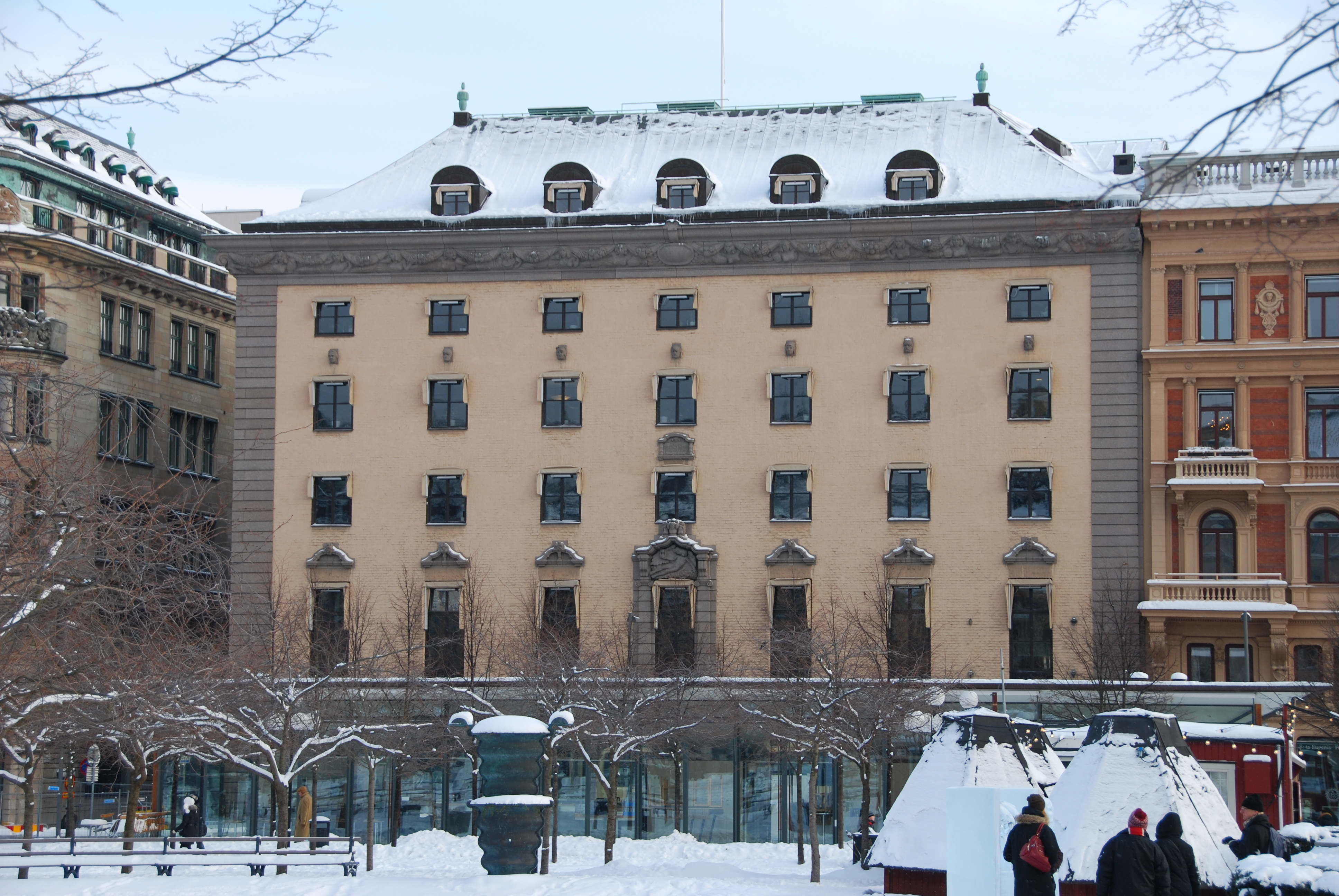 Thulehuset på Kungsträdgårdsgatan. Idag huvudkontor för Systembolaget